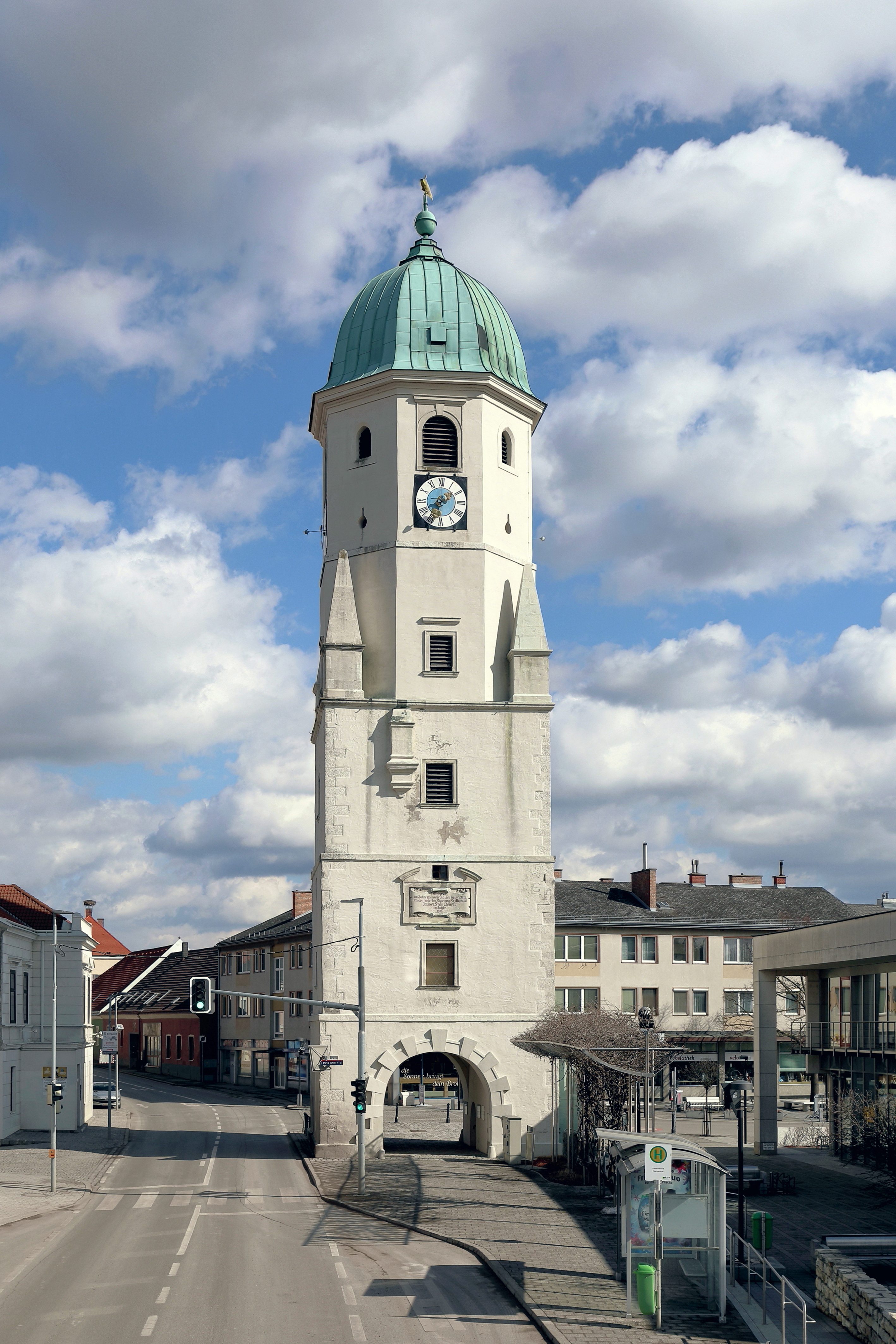 Westansicht des Stadtturmes, auch als Markt- und Fischaturm bezeichnet, in der niederösterreichischen Stadtgemeinde Fischamend.Das Wahrzeichen der Stadt wurde ursprünglich um 1050 als Grenz- und Wachturm errichtet. Im 17. Jahrhundert wurde er um 2 achteckige Geschosse erhöht. Anlässlich der Straßenregulierung wurde 1728 die kreuzgratgewölbte Durchfahrt ausgebrochen und 1978 erfolgte die Verlegung der Bundesstraße 9 (Hainburger Straße/ Wiener Straße), so dass der Marktturm seitdem umfahren wird. Nach einem Brand 1834 wurde das Wahrzeichen renoviert und erhielt weitgehend sein heutiges Erscheinungsbild. Bis 1927 diente der Turm als Gemeindestube und Nachtwächterwohnung und wird seither als Heimatmuseum genutzt.